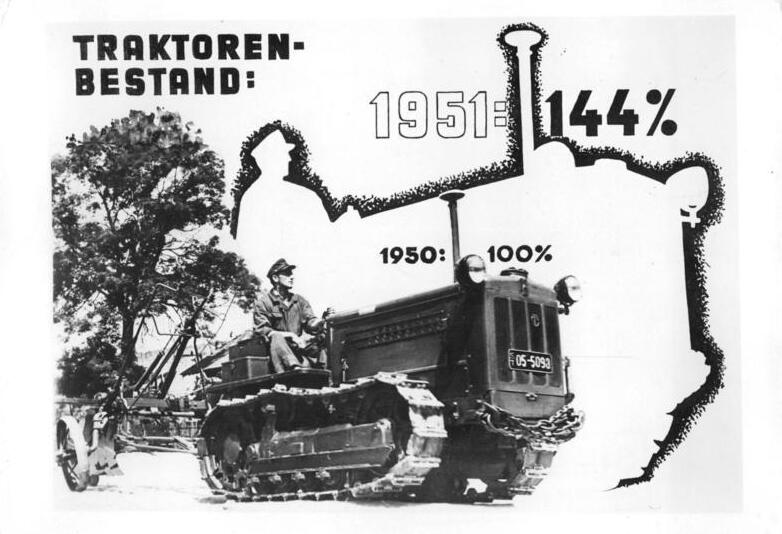 Infografik, Traktorenbestand 1950 und 1951 Aufn: Illus Stolp Berlin-W.8 505.AV 26.3.1951 Wichtige Zahlen des Plans 1951. Die im Volkswirtschaftsplan 1951 der Landwirtschaft gestellten Aufgaben erfordern eine bessere und intensivere Bearbeitung des Bodens. Der Volkswirtschaftsplan sieht deshalb u.a. eine Steigerung der MA Stationen auf 540 vor und die Erhöhung des Traktorenbestandes um 44% gegenüber 1950.